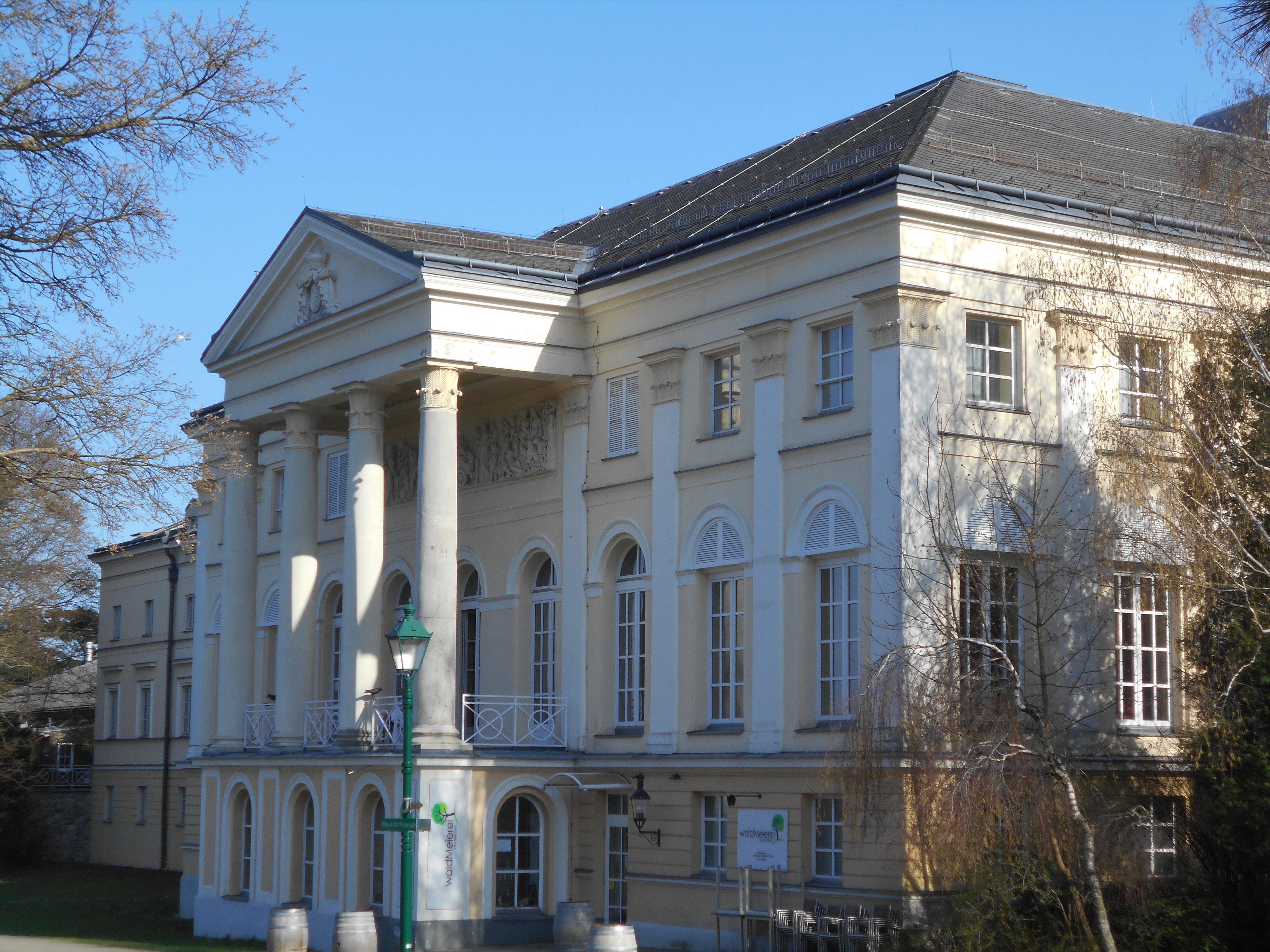 Schloss Liechtenstein (heute Altenwohnheim)